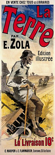 Placard publicitaire pour le roman La Terre. ca 1880